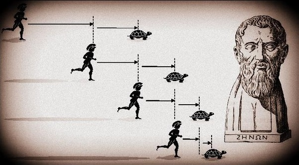 Зенон